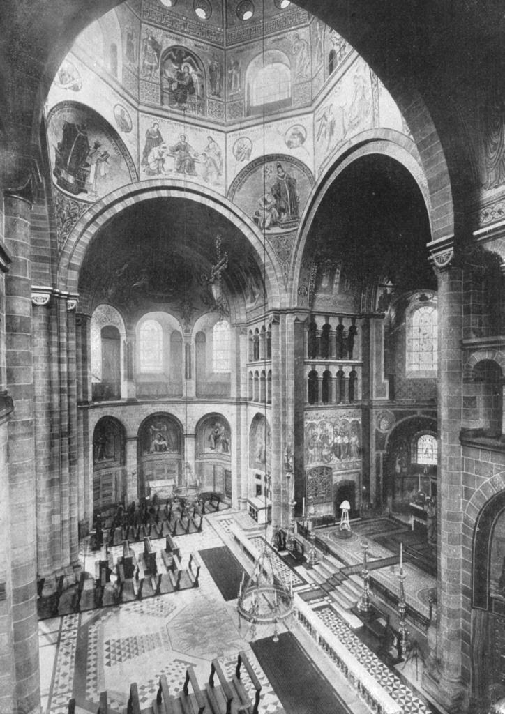 St. Aposteln Innenansicht um 1925